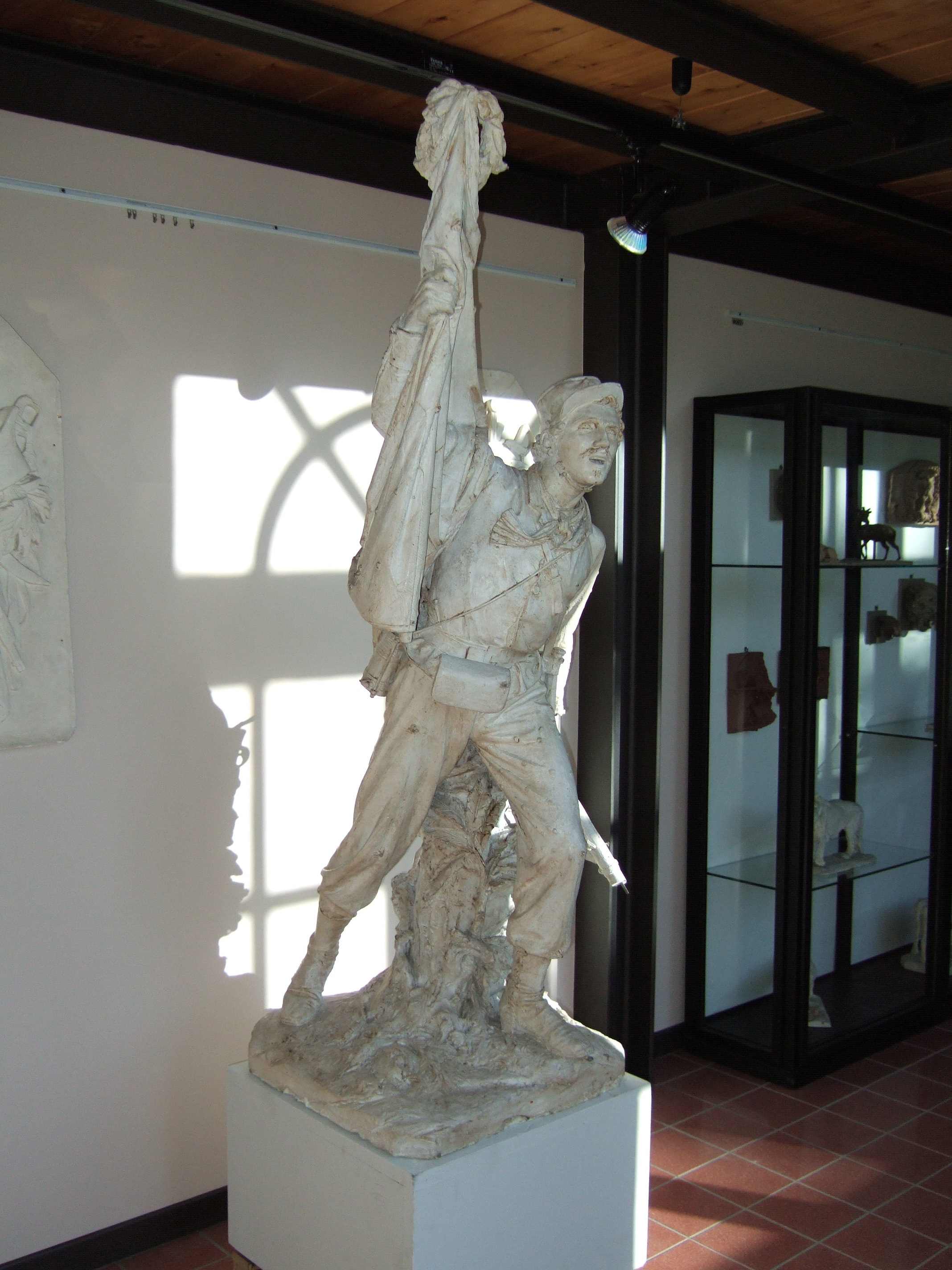 Luigi Buzzi Leone: bozzetto in gesso del Monumento al Cacciatore delle Alpi, Viggiù (VA) Museo della Scultura viggiutese dell'Ottocento